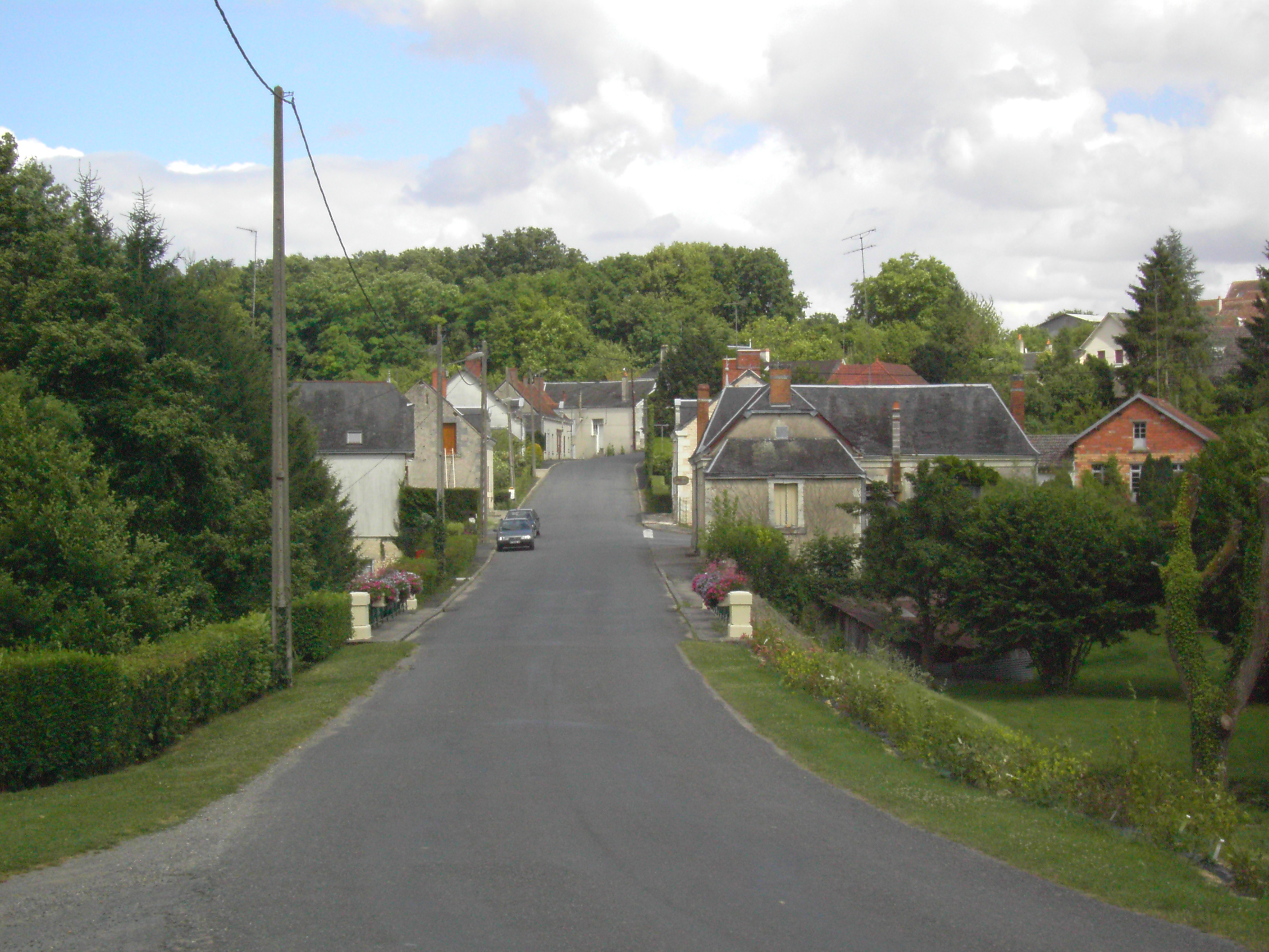 Entrée de la commune